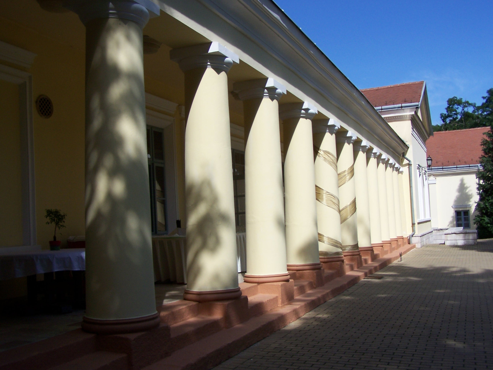 Podmaniczky-kastély (Verseg, Fenyőharasztipuszta) This is a photo of a monument in Hungary. Identifier: 7586